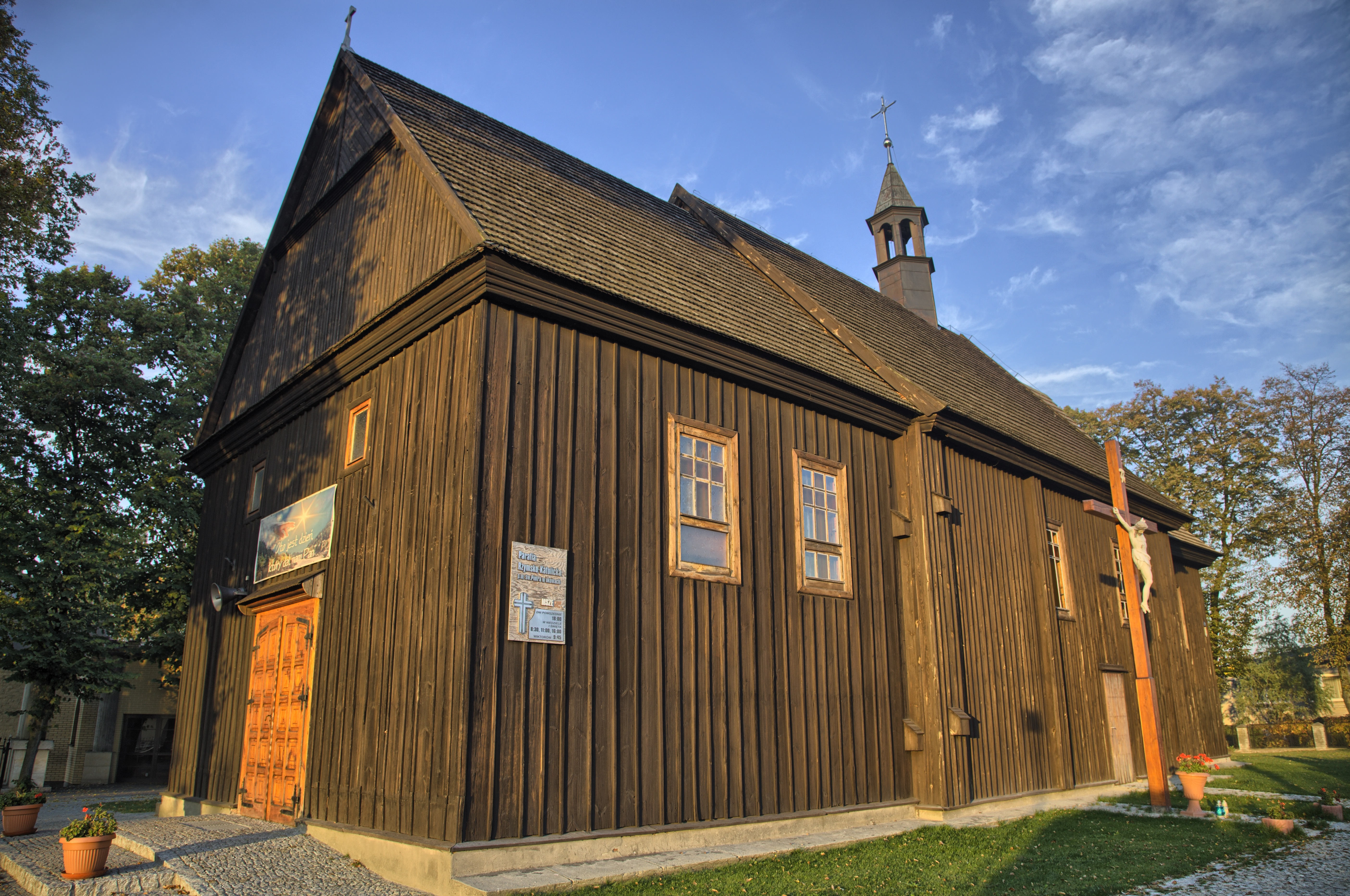 Biała-Parcela kościół św. Piotra, 1743